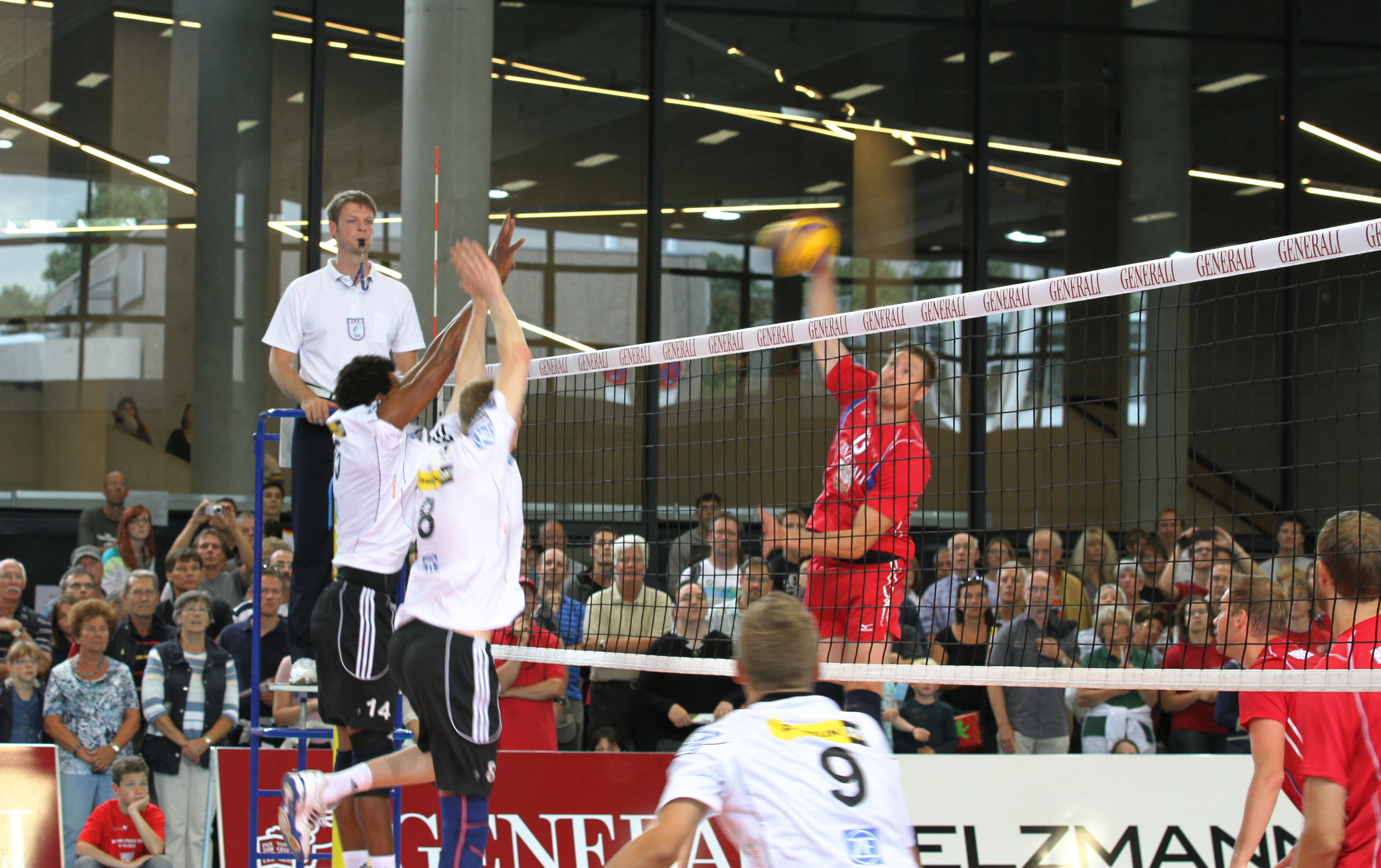 Volleyballspiel TSV Unterhaching - VfB Friedrichshafen, am 26. August 2012 in der Münchner Kleinen Olympiahalle. Das Spiel diente der Saisonvorbereitung.